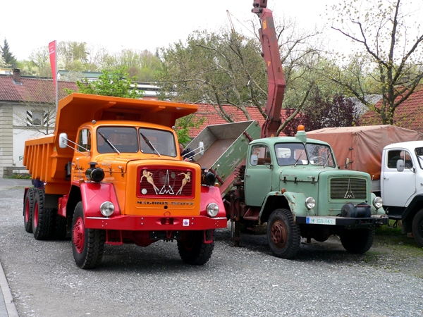 Magirus-Deutz образца 1953 года, предшественник бамовских Магирусов